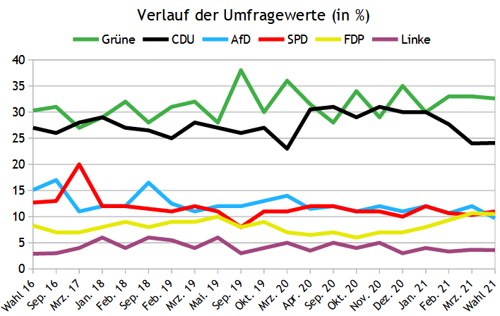 Umfragen zur nächsten Landtagswahl in Baden-Württemberg